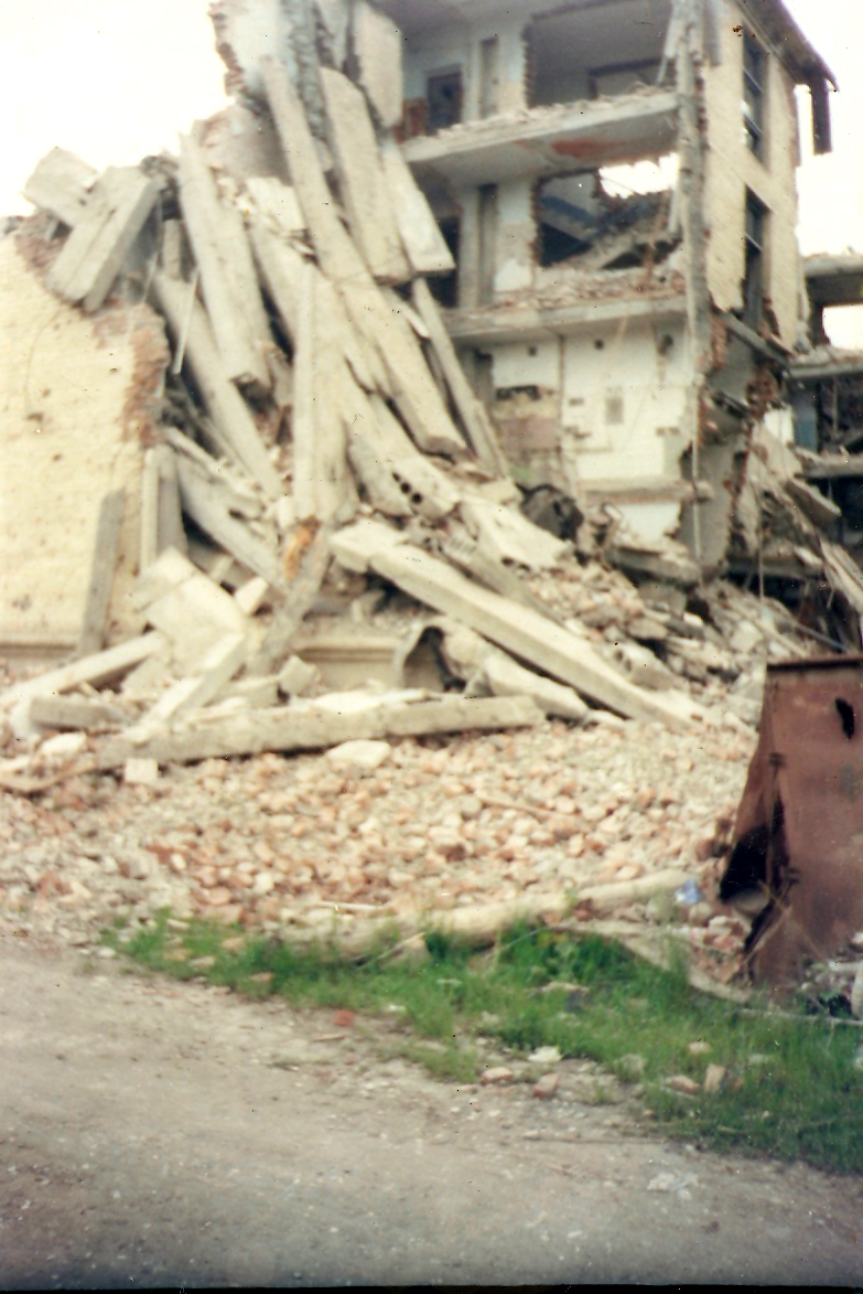 Чечня, дом по улице Заветы-Ильича